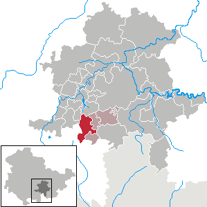 Lichte in Thuringia - District Saalfeld-Rudolstadt